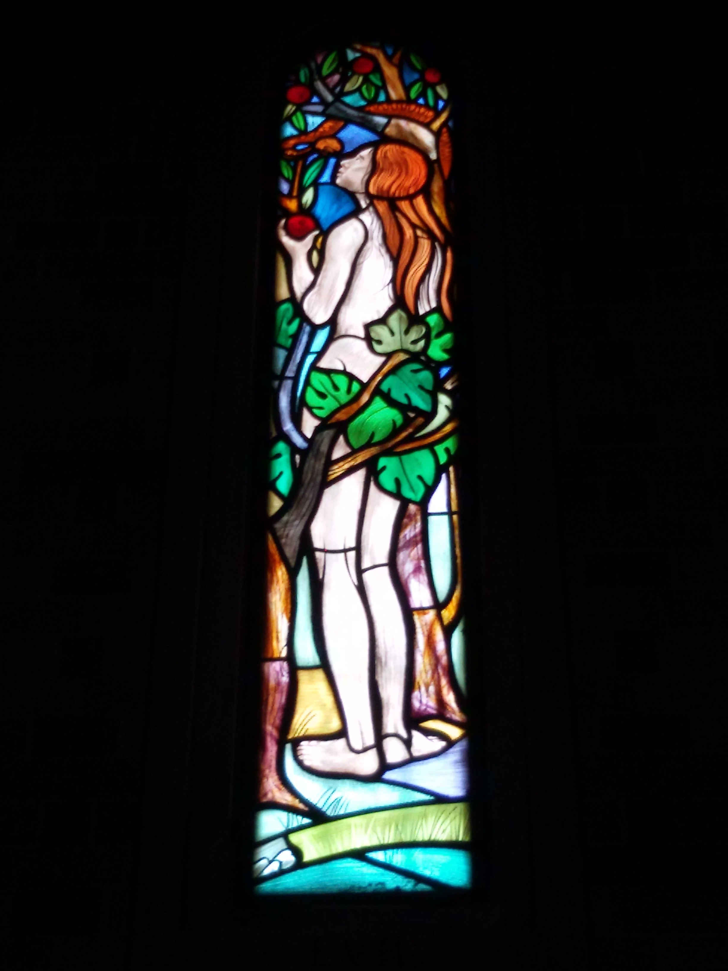 vetrata